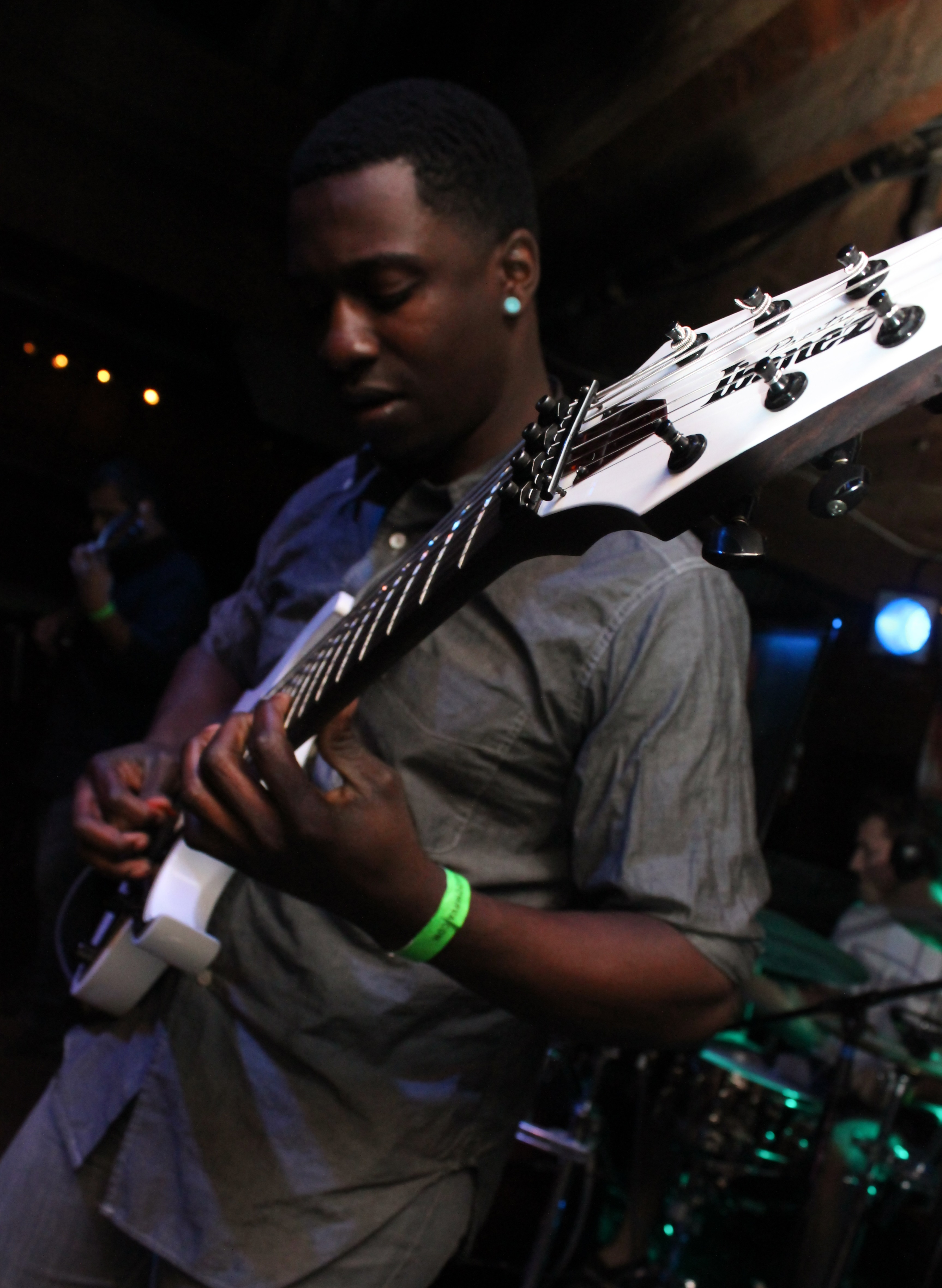 Tosin Abasi, 11/1/11, Richmond, VA